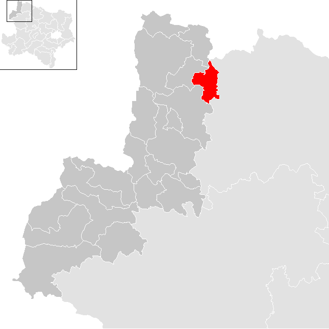 Bezirk Gmünd